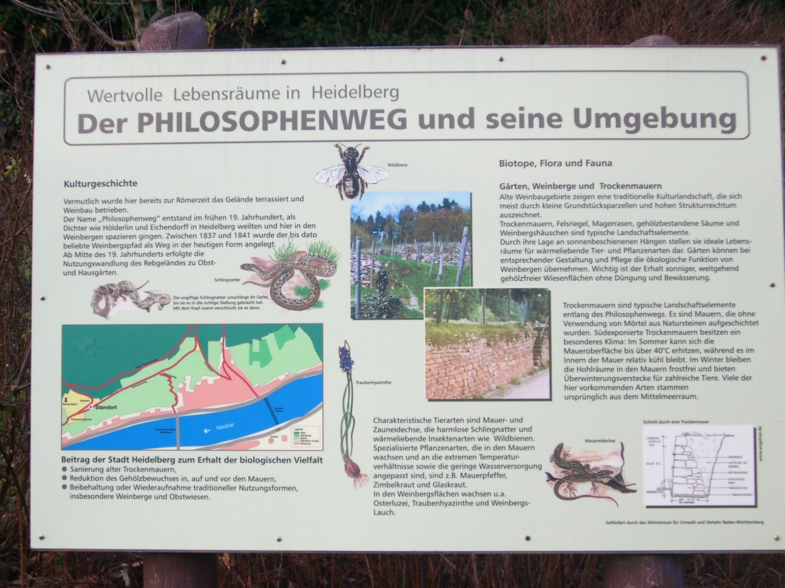 Heidelberg Philosophenweg